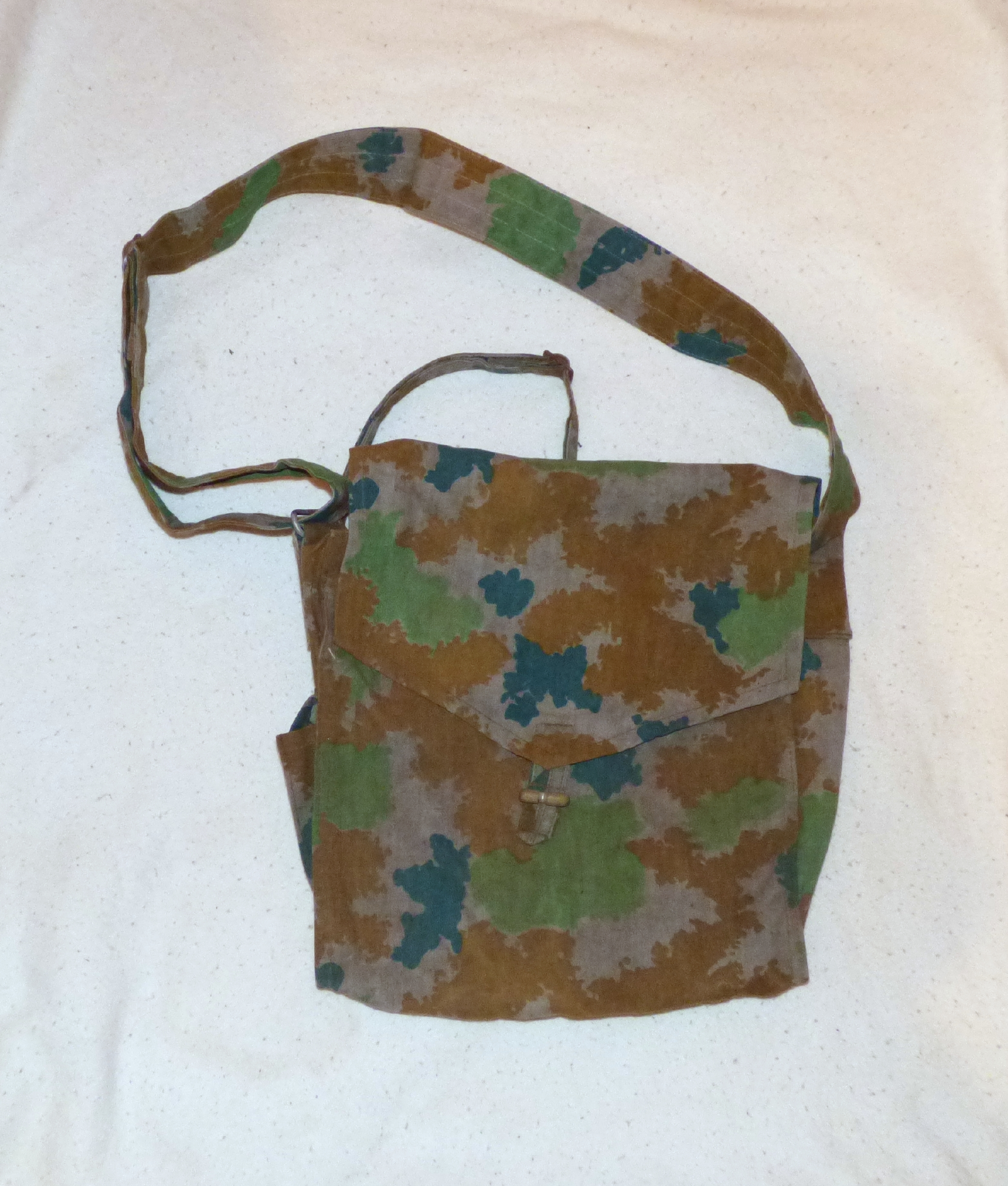 Flecktarn der NVA